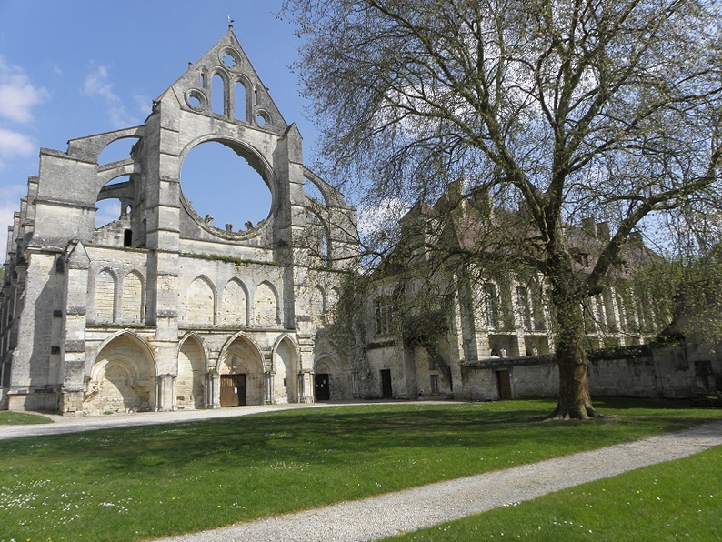 Abbaye de Longpont (02).